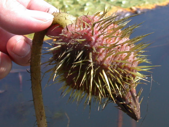 オニバスの果実 2002年10月2日撮影。1600*1200ピクセルの画像を1000*750に縮小、640*480にトリミングしている。 元の画像は同じだけど別のトリミング版はすでに私のウェブサイトで公開中。